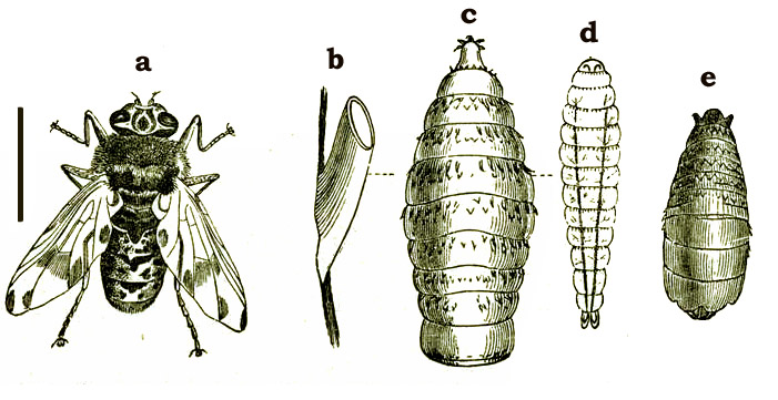 Horse botfly